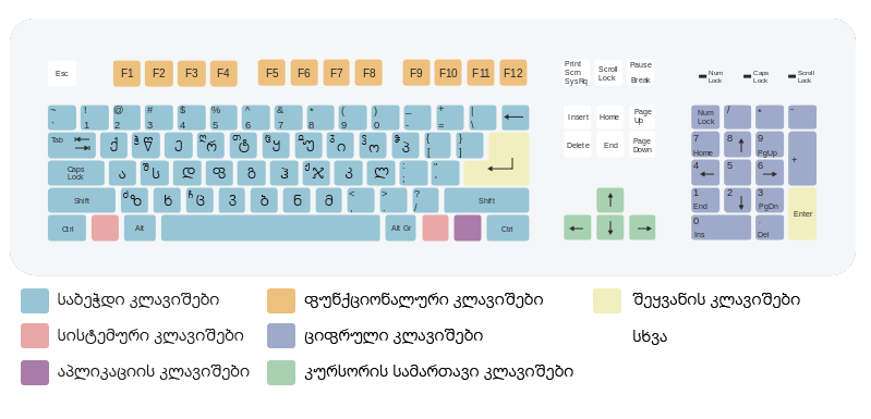 ქართული კლავიატურა QWERTY განლაგებით